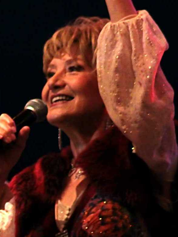 Edina Pop, Dschinghis Khan - Ihre größten Hits Tour 2009